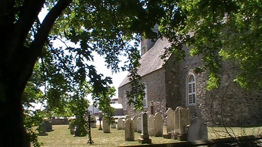 Petite église de Saint-François de l'Île d'Orléans au Québec et son vieux cimetière (1734). Paroisse fondée dans le dernier quart du XVII ième siècle.